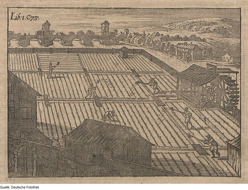 Original image description from the Deutsche Fotothek Textilverarbeitung & Bleichen